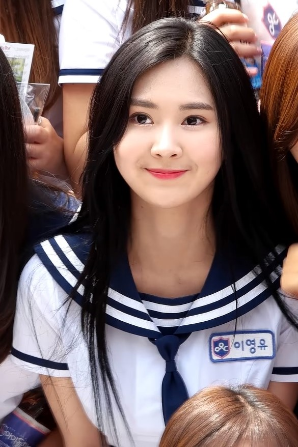 170712 홍대 걷고 싶은 거리 - 아이돌학교 입학 선서 투어